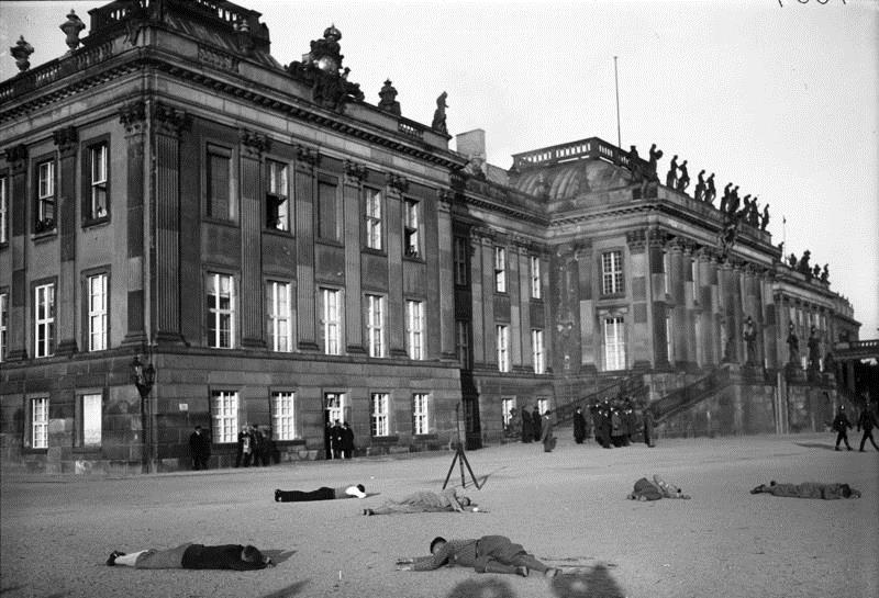 Gaschutzübung am Stadtschloß in Potsdam